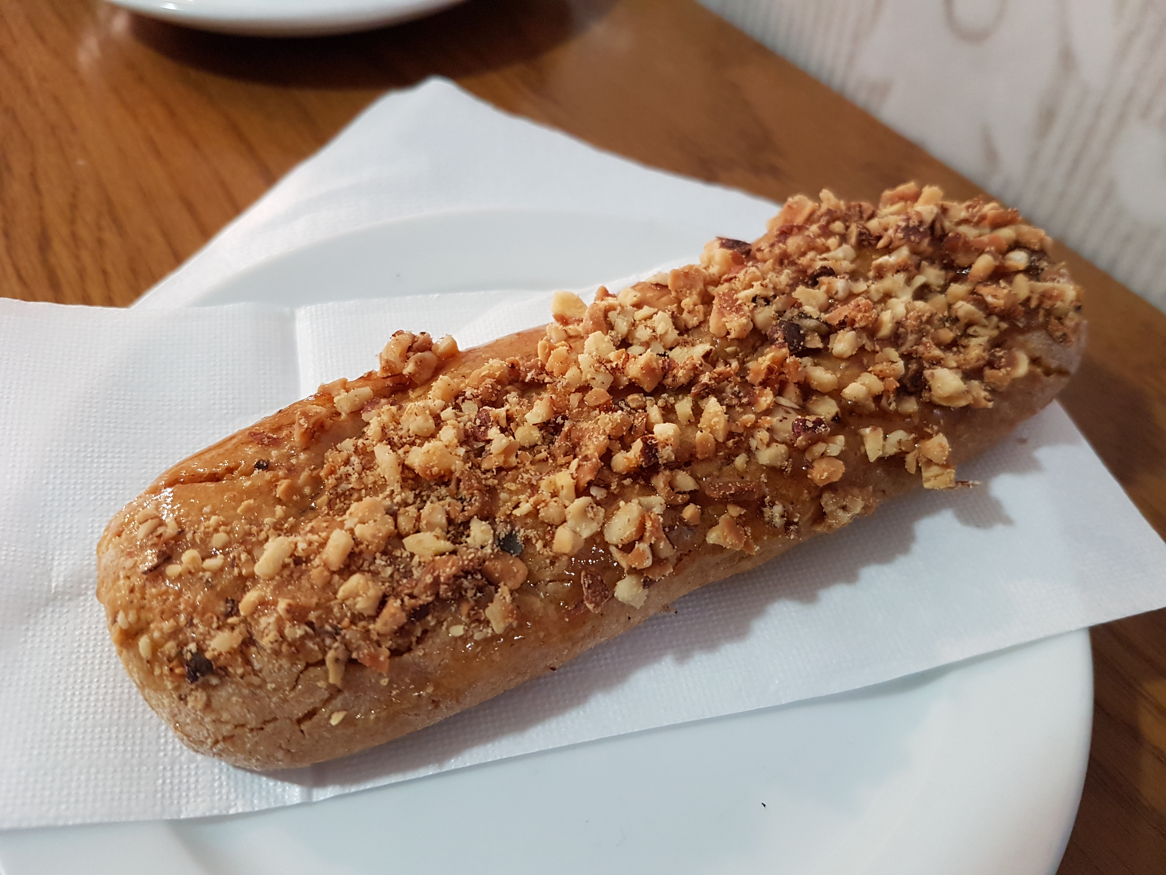 Kwareżimal, ein maltesisches Gebäck.